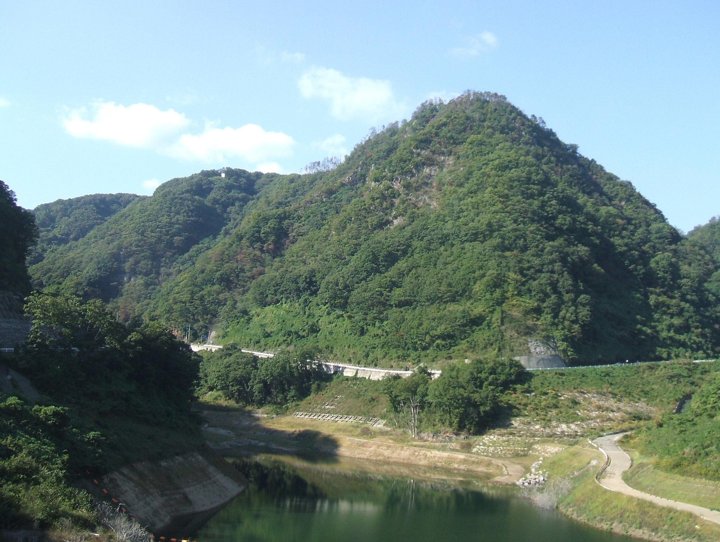 広島県福山市にある志川滝山城を南側から撮影。下に見えるのは四川ダムの貯水湖である。